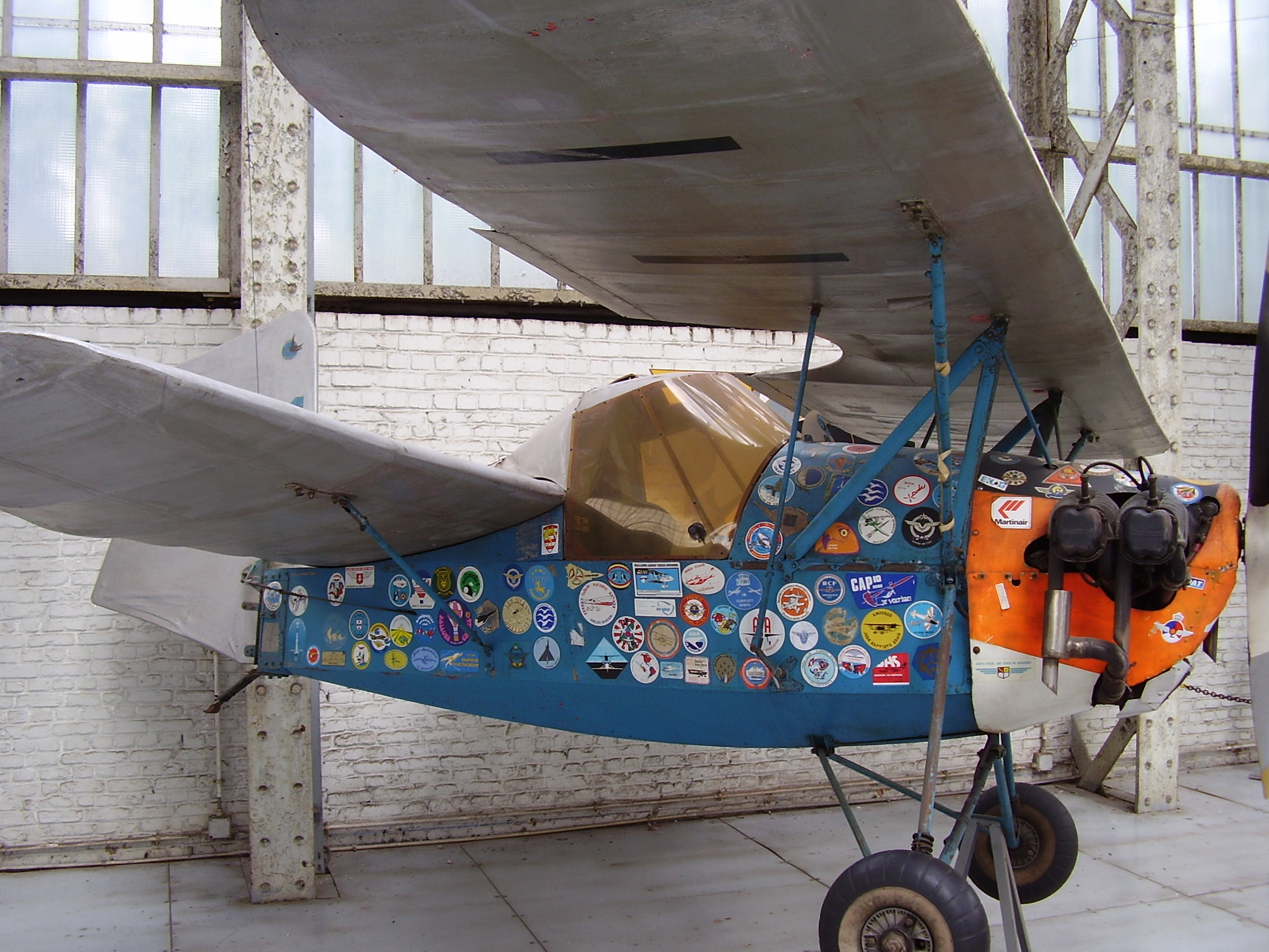 Mignet HM.293 at Royal Military Museum Brussels, Musée Royal de l'Armée, Koninklijk Museum van het Leger en de Krijgsgeschiedenis